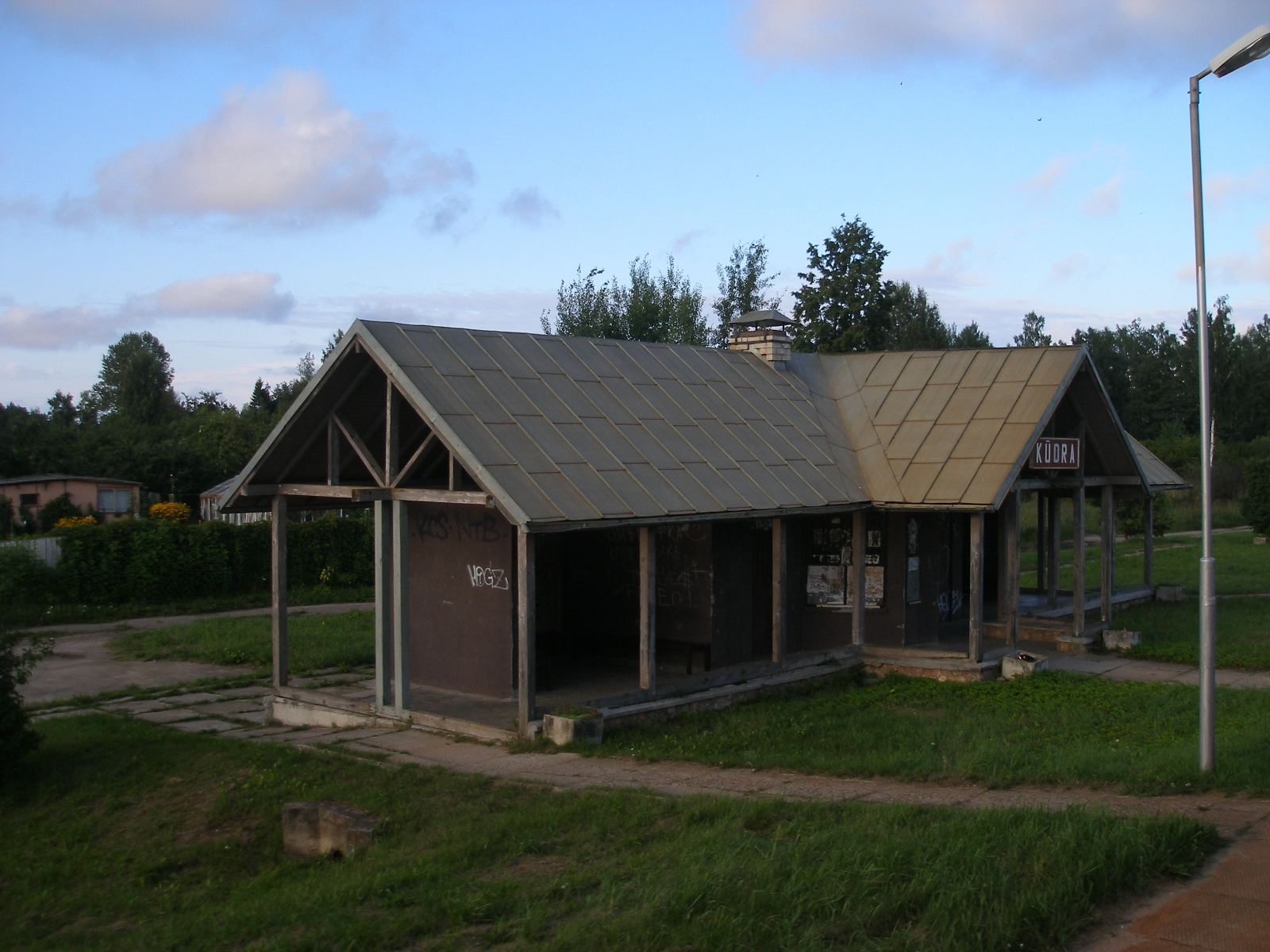 Kūdras stacijas ēka.